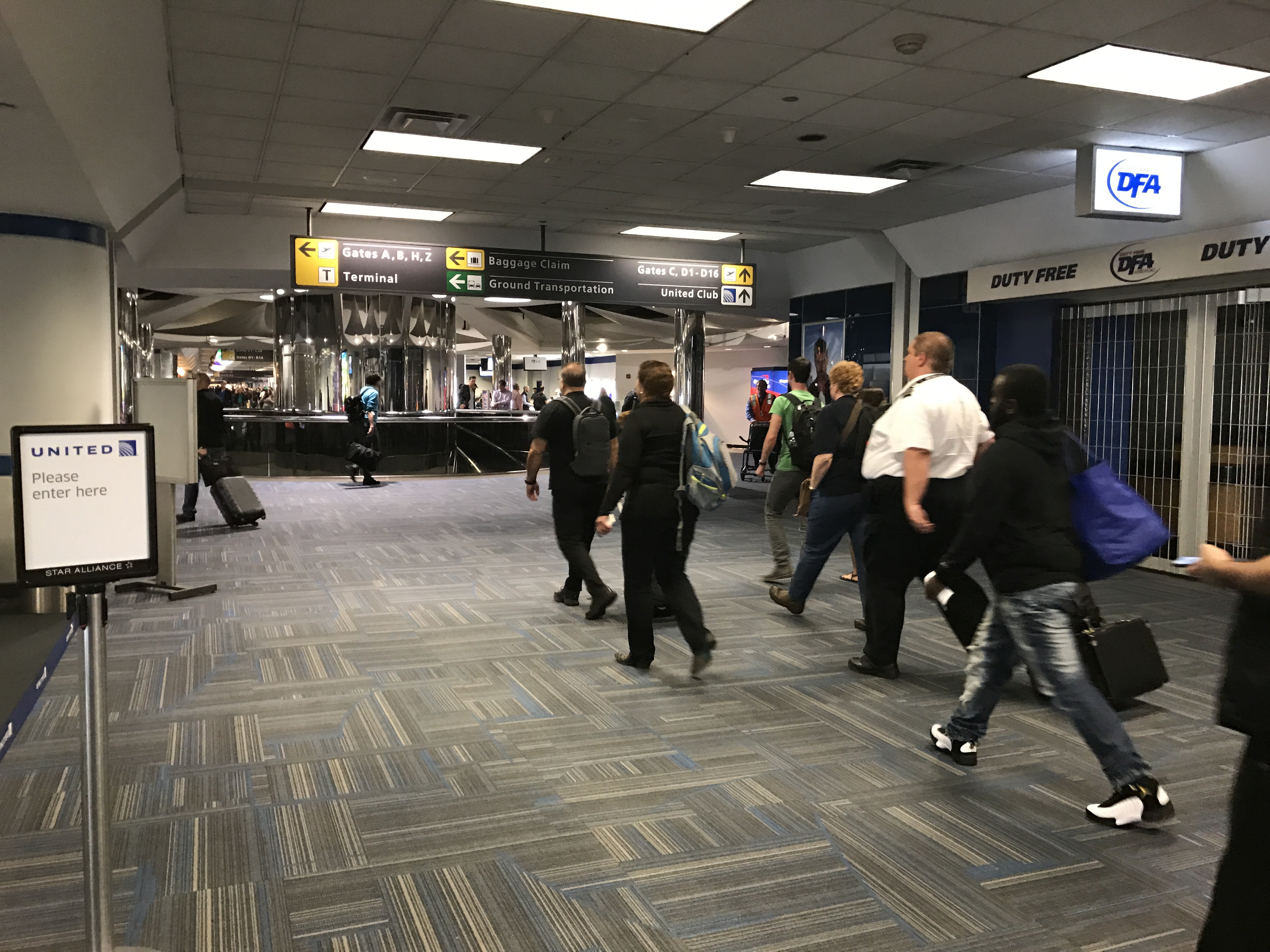 Sala D del Aeropuerto Internacional de Washington Dulles.